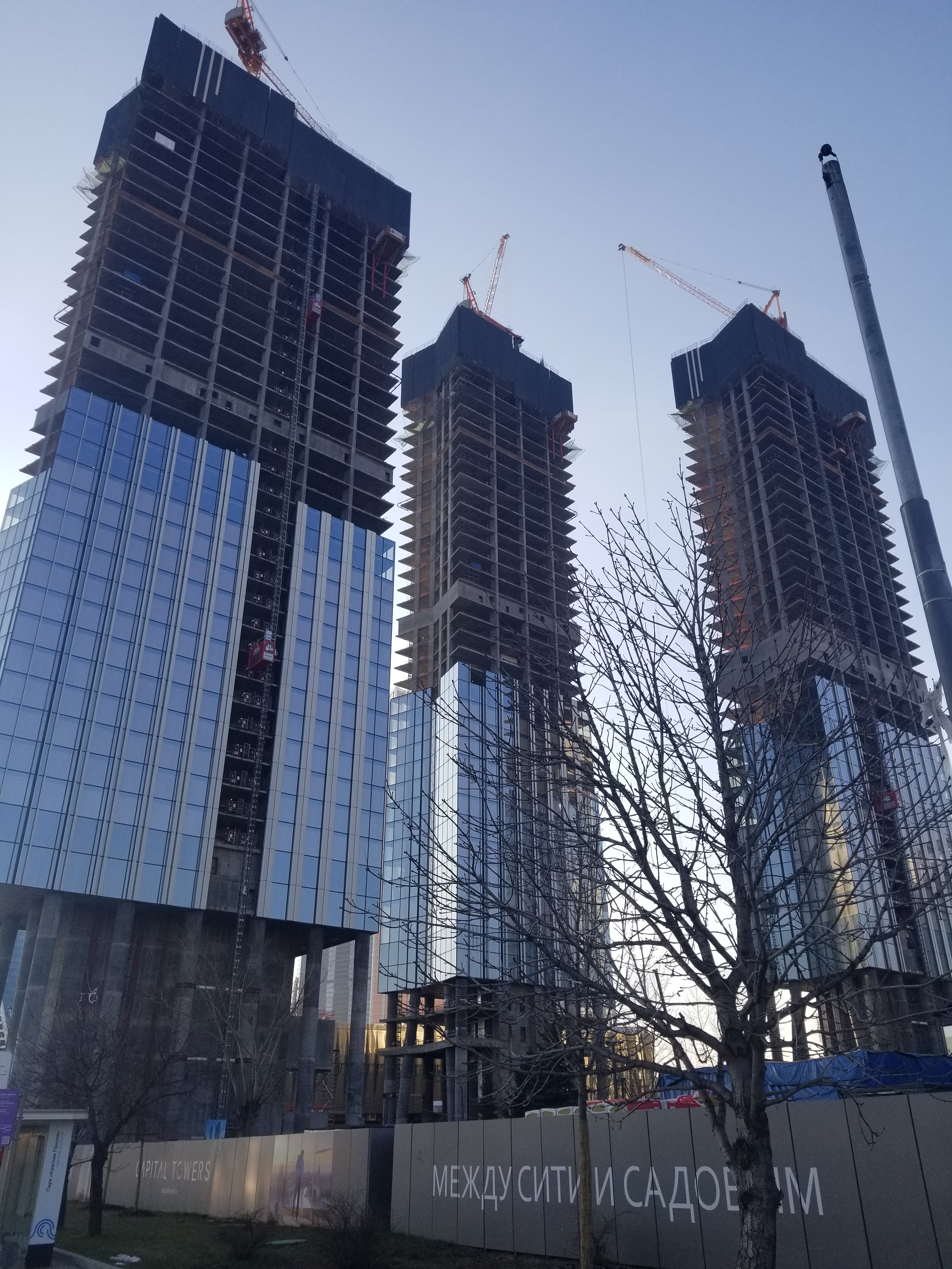 Capital Towers